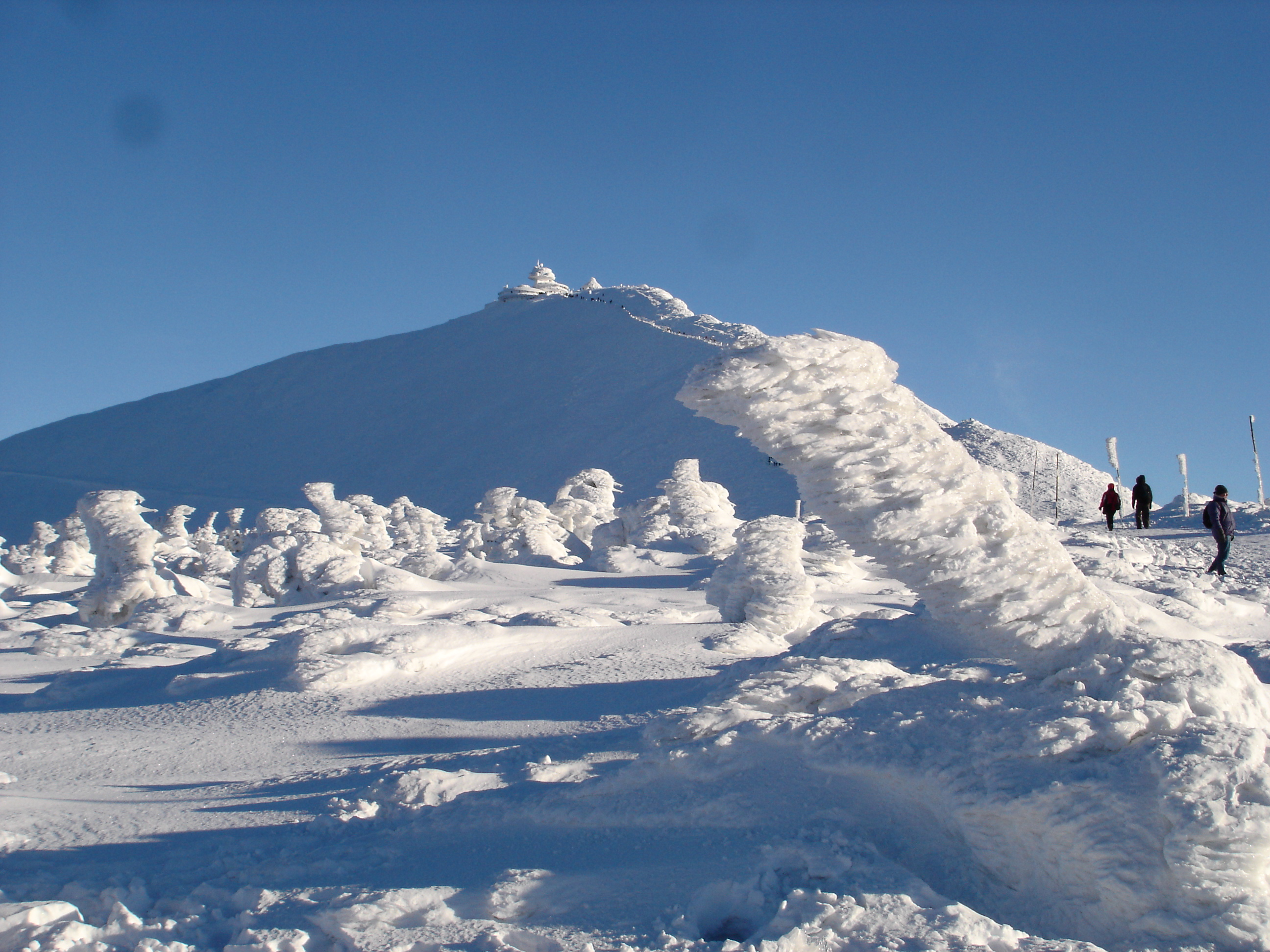 Die Schneekoppe am 29.12.2008